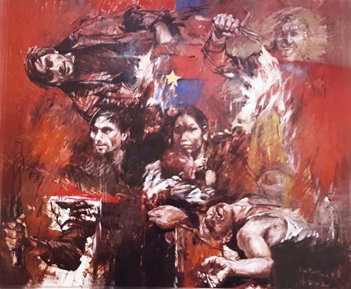 Vietnam III mit Rudi Dutschke, 1968, 125 x 145 cm, Öl auf Leinwand, Bez. u.r.”Febr. 68 Timner”